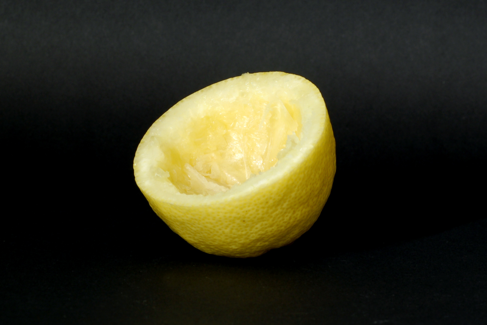 ausgepresste Zitrone